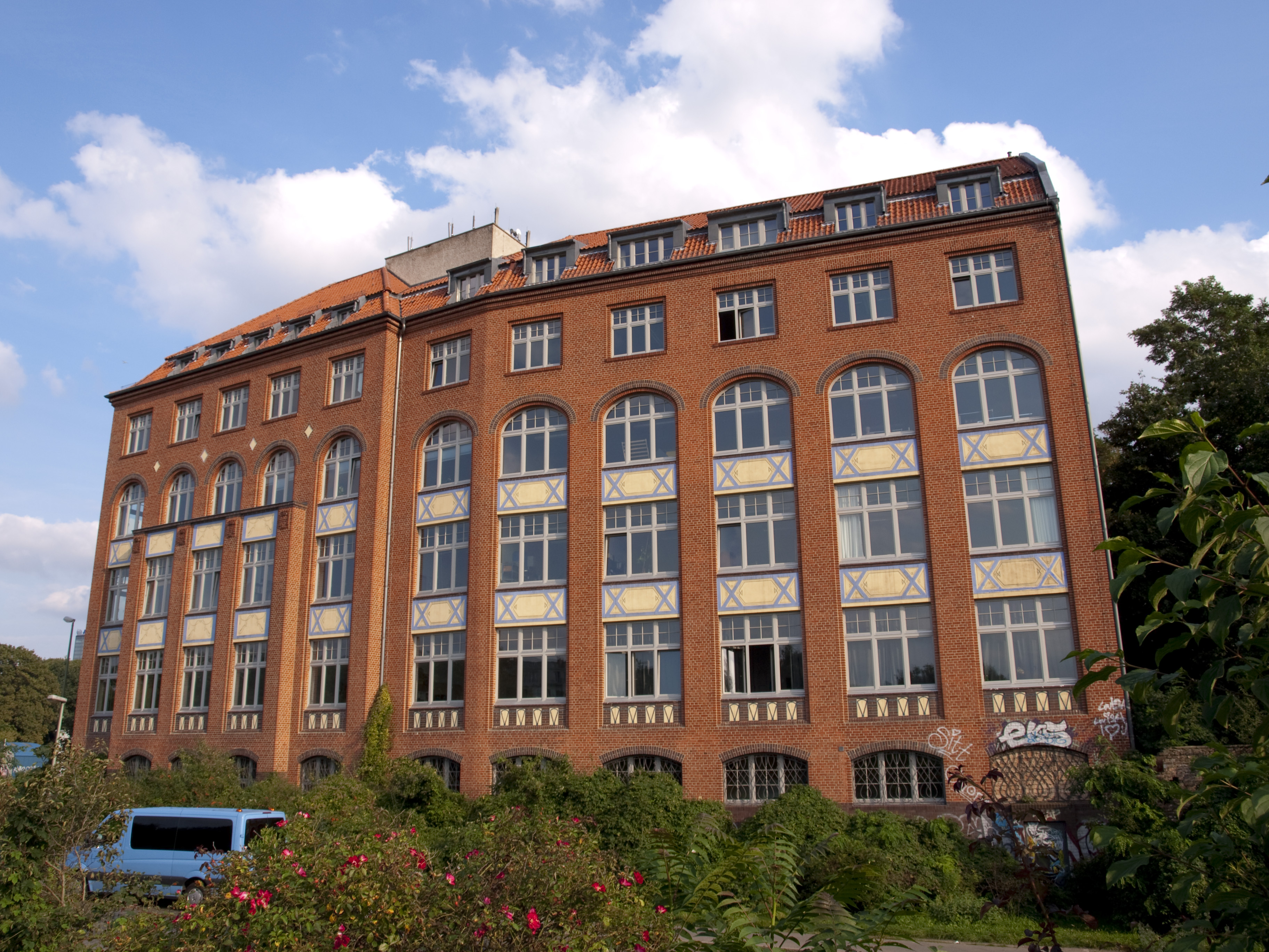 09020334 - Jordanstraße 1-4, Agfa-Fabrik, 1901-12 von Paul Karchow Lohmühlenstraße 65-66. Sicht von Lohmühlenstraße.